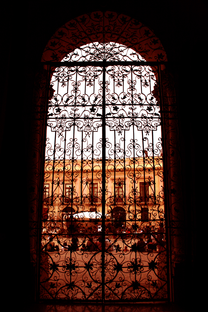 Cancello del Duomo di Siracusa, Italia.